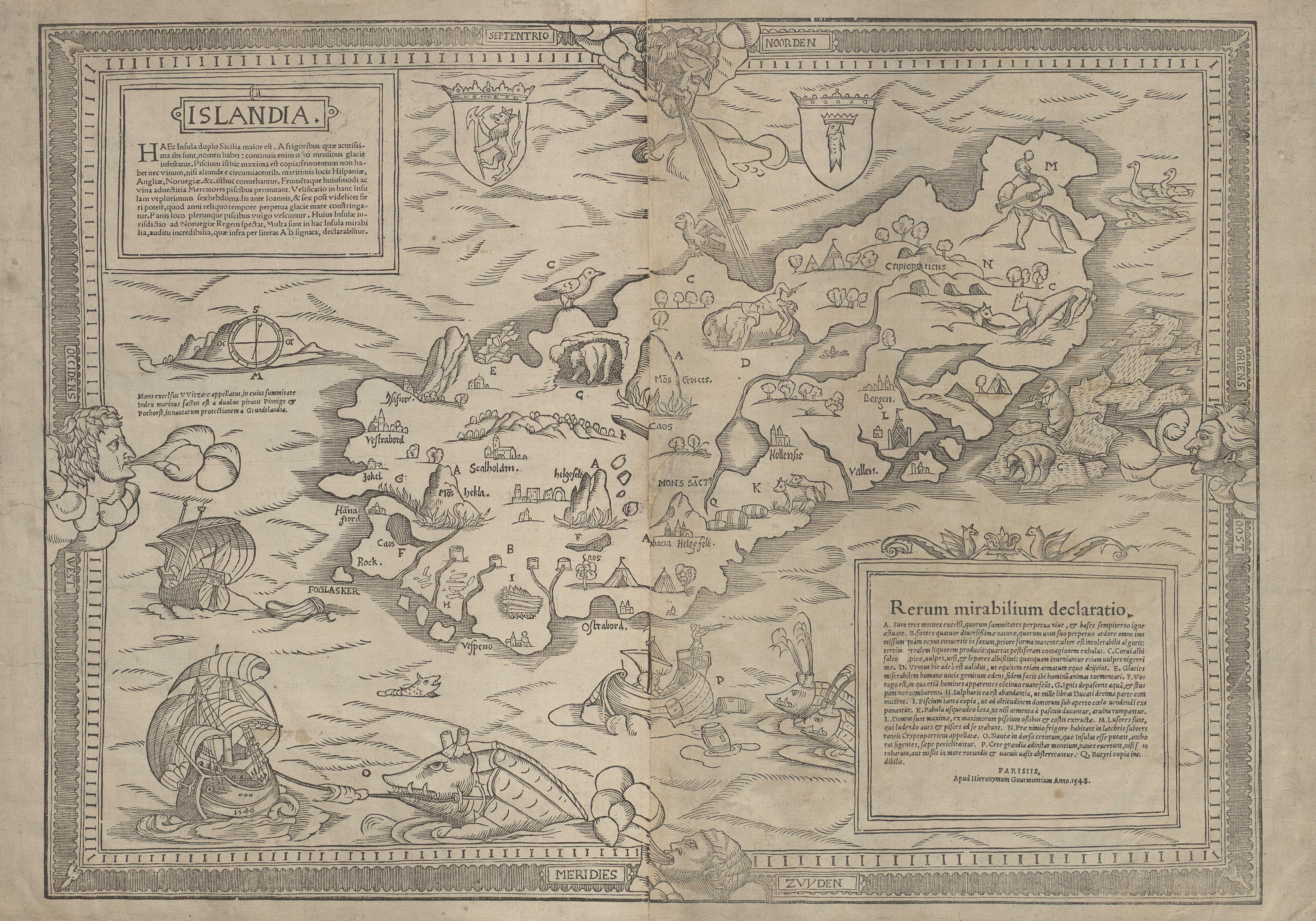 Carte de l'Islande par Hieronymus Gourmont en 1548.